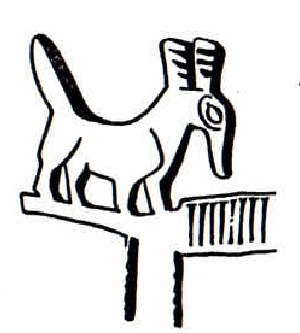 Seth (animal debout) figuré sur sur la massue du roi Scorpion